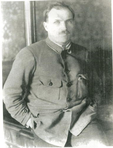 Артем во время работы в Донбассе